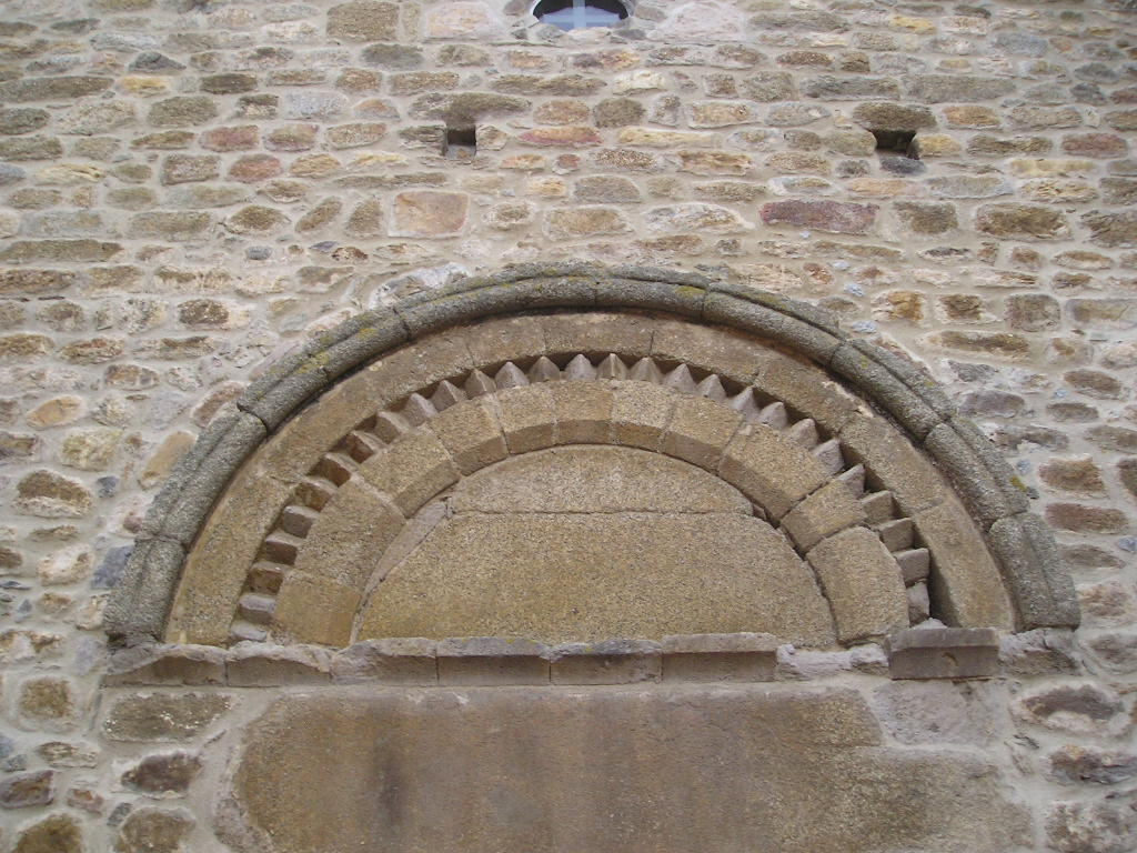 Arco de medio punto. Iglesia en l'Empordà.